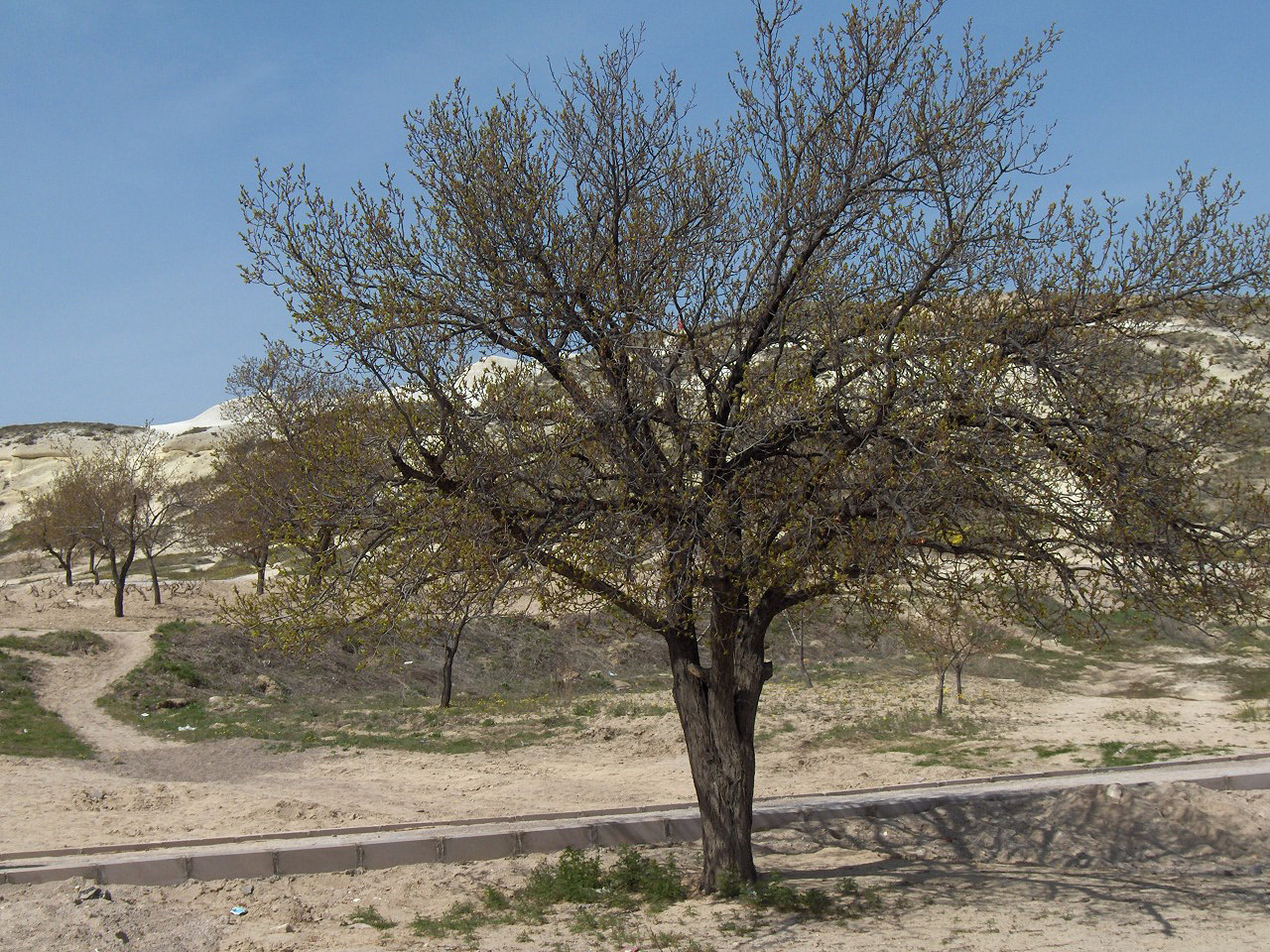 Apricot tree (Prunus armeniaca); Pasa Baglari, Central Cappadocia, Turkey